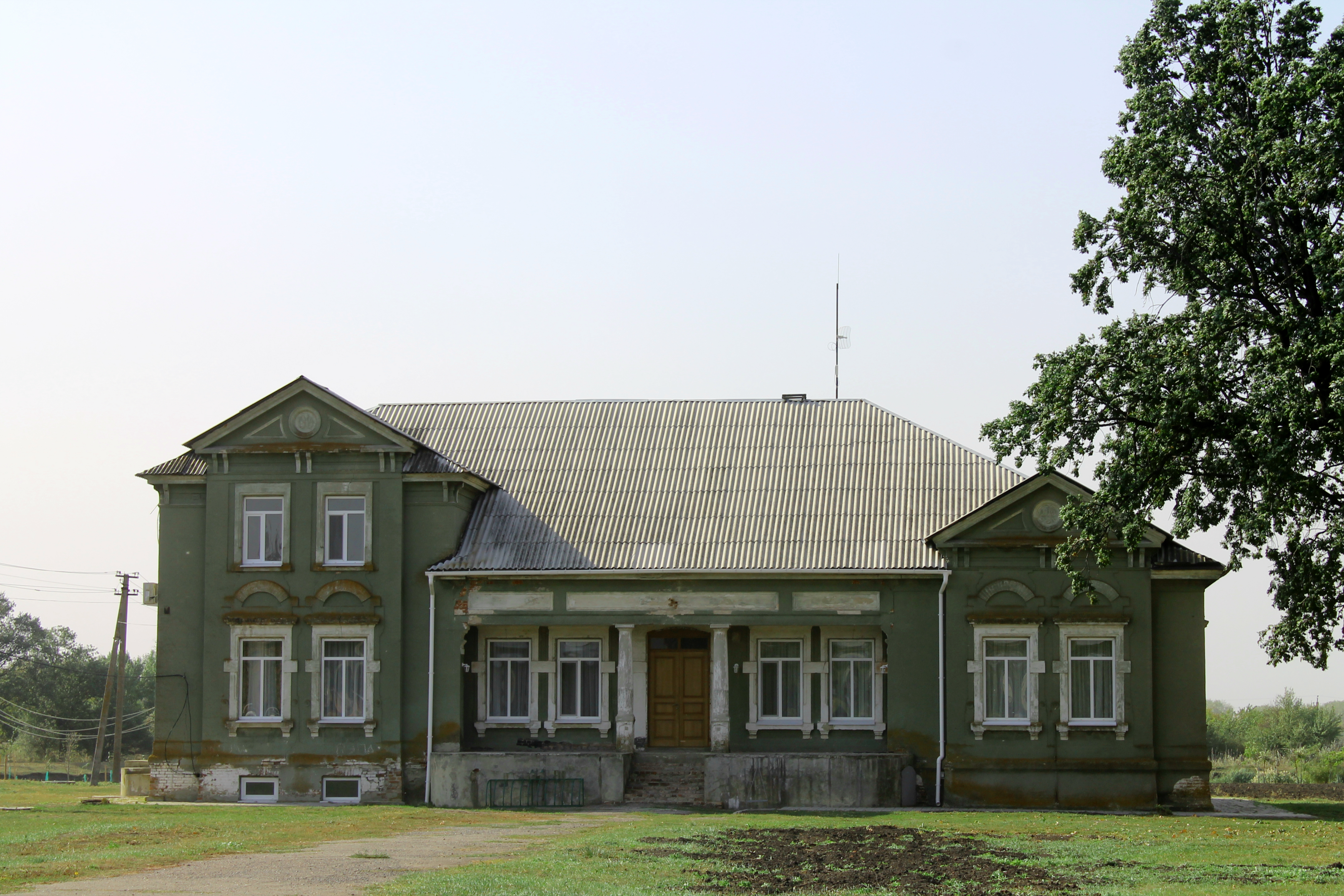 Поміщицька садиба (мур.), село Зелене